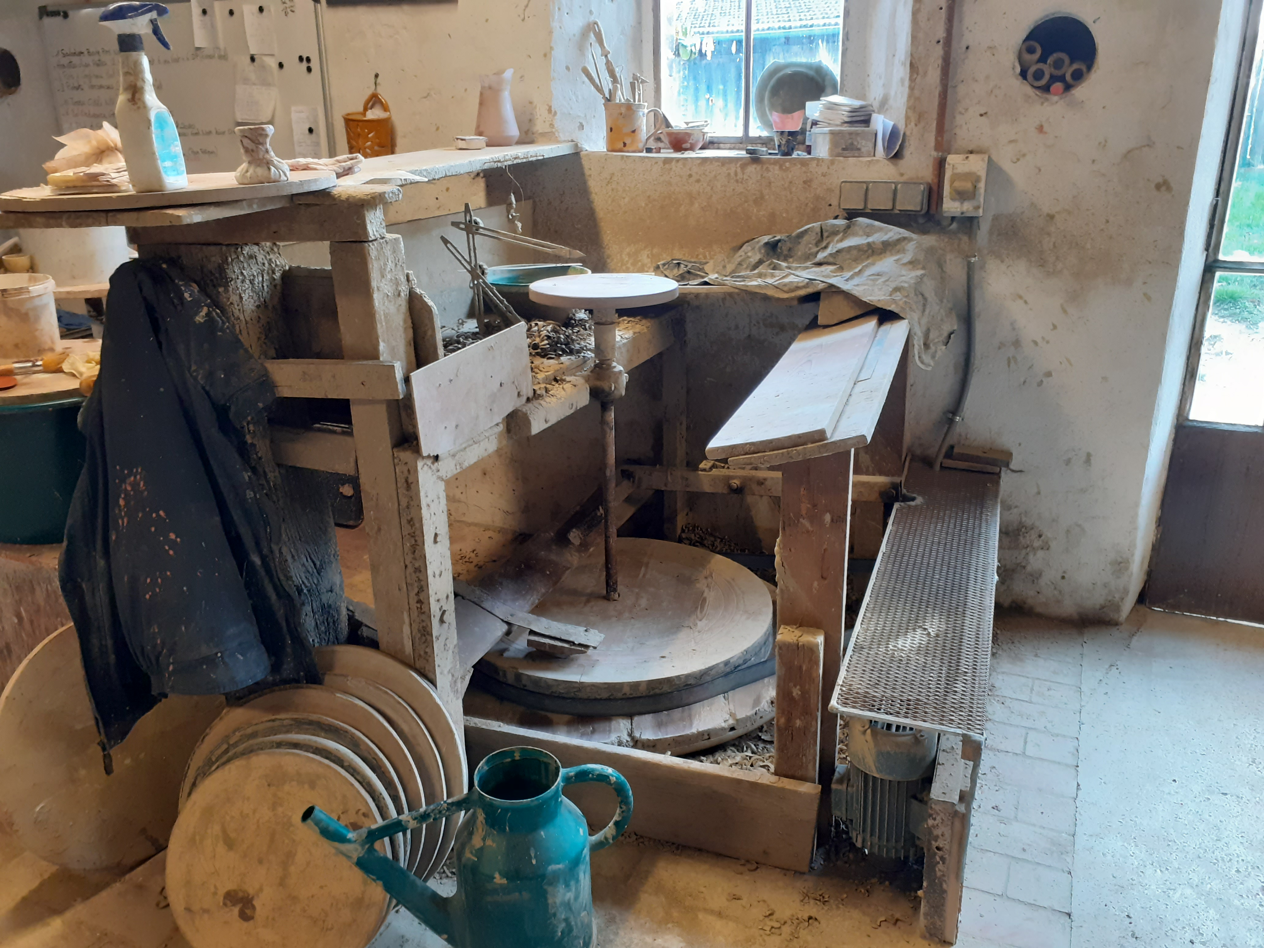 Un des trois tours de potiers de la fabrique. Actionné par la roue inférieure ("volant"), ils sont électrifiés depuis 1960, auparavant ils étaient actionnés par les pieds du tourneur.